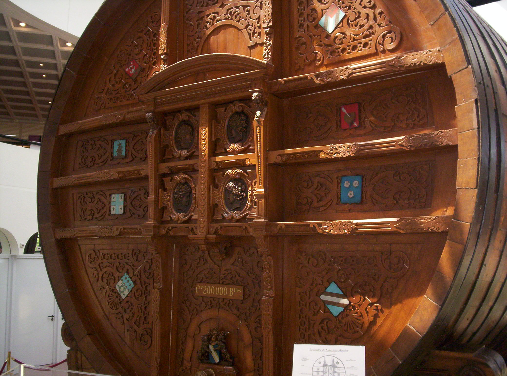 Visite des Caves Mercier à Épernay (Marne, France) :le foudre par Gustave Navlet.